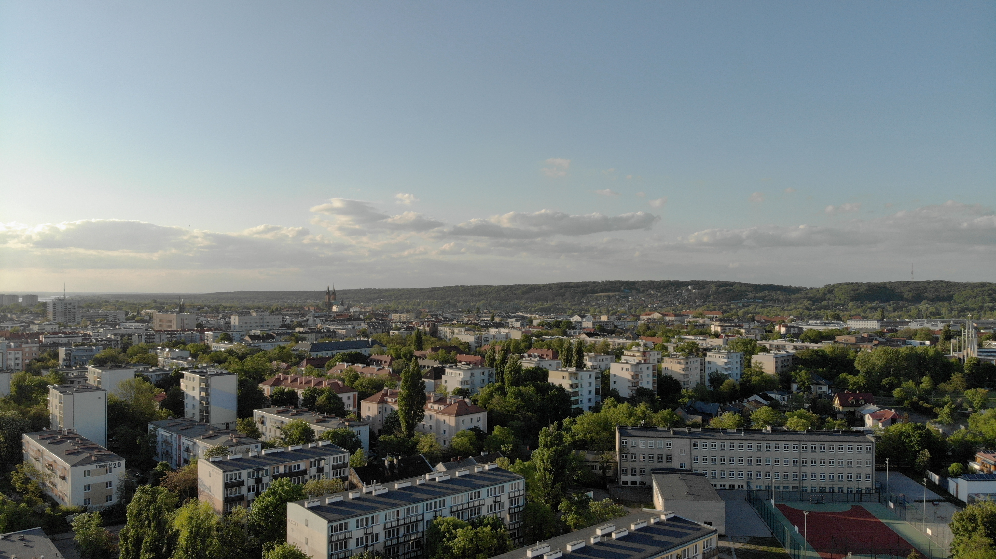 Śródmieście (2020 r.)